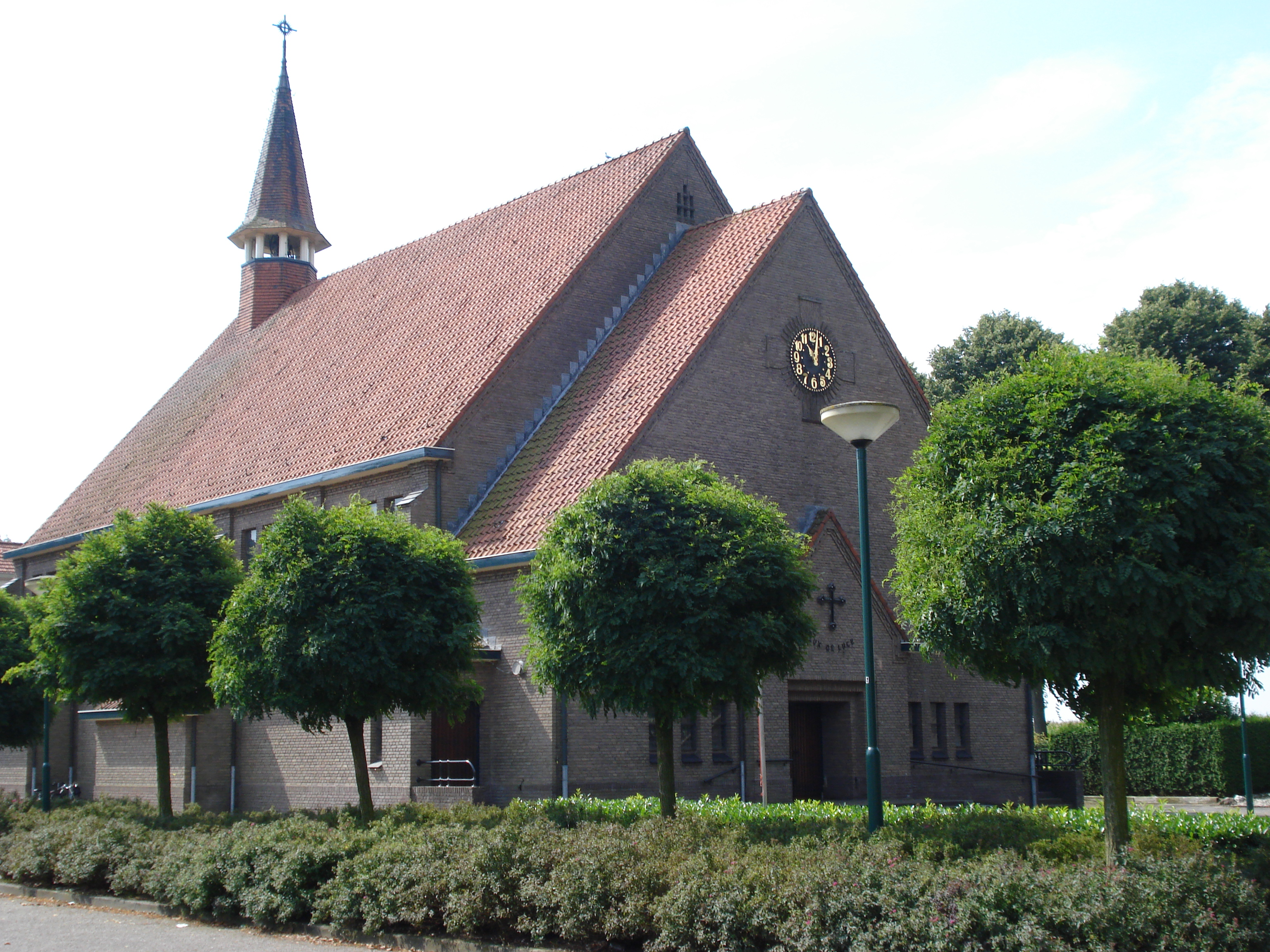 Langenboom, Brabant-Septentrional, église de la Sainte Famille, architecte Eduard Cuypers, 1926.